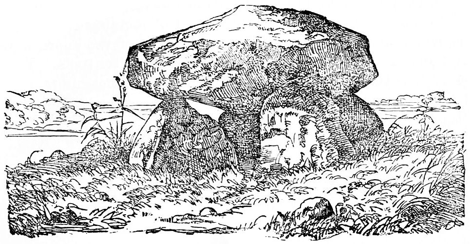 Danish dolmens